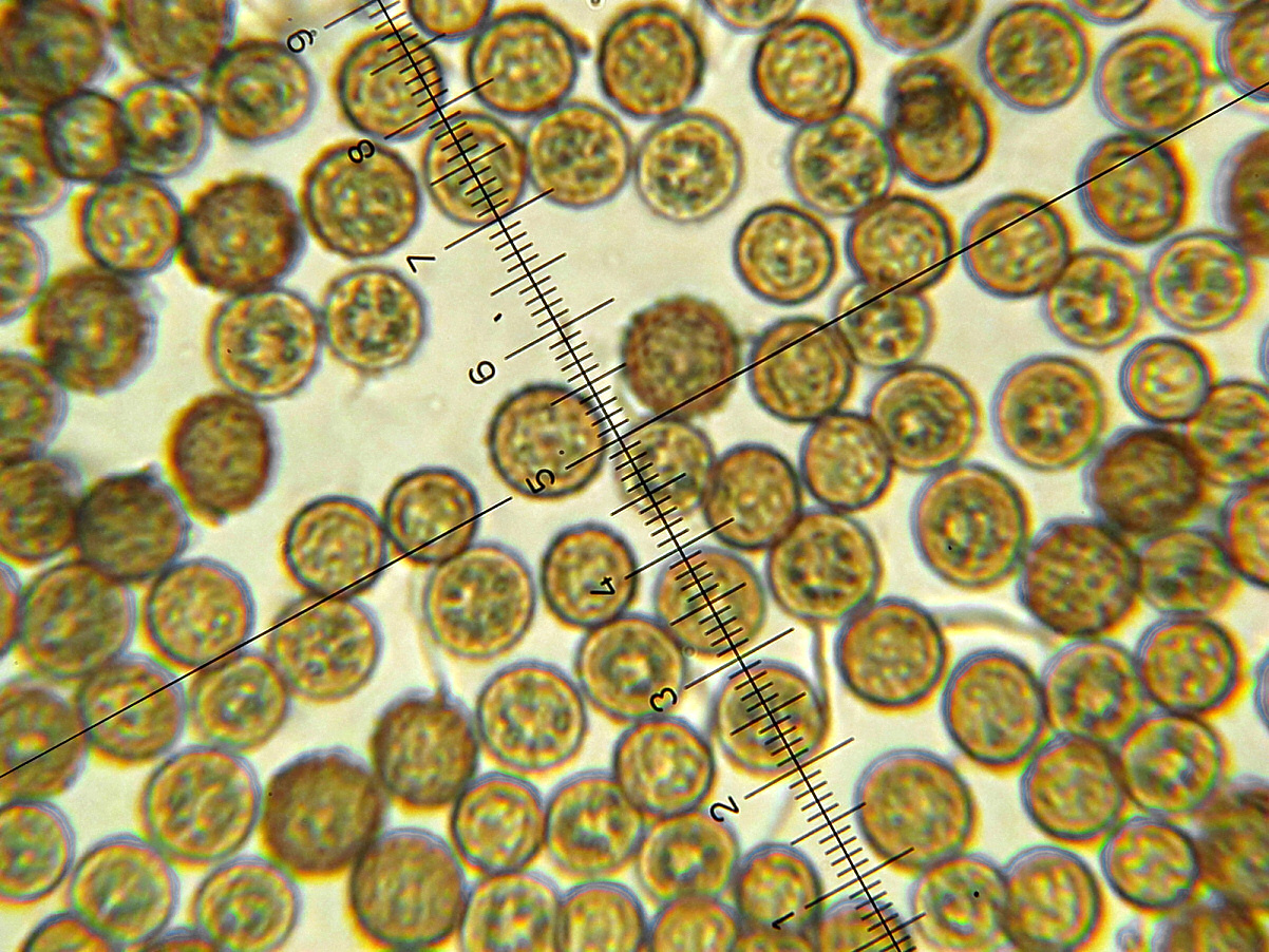 Ustilago maydis (DC.) Corda